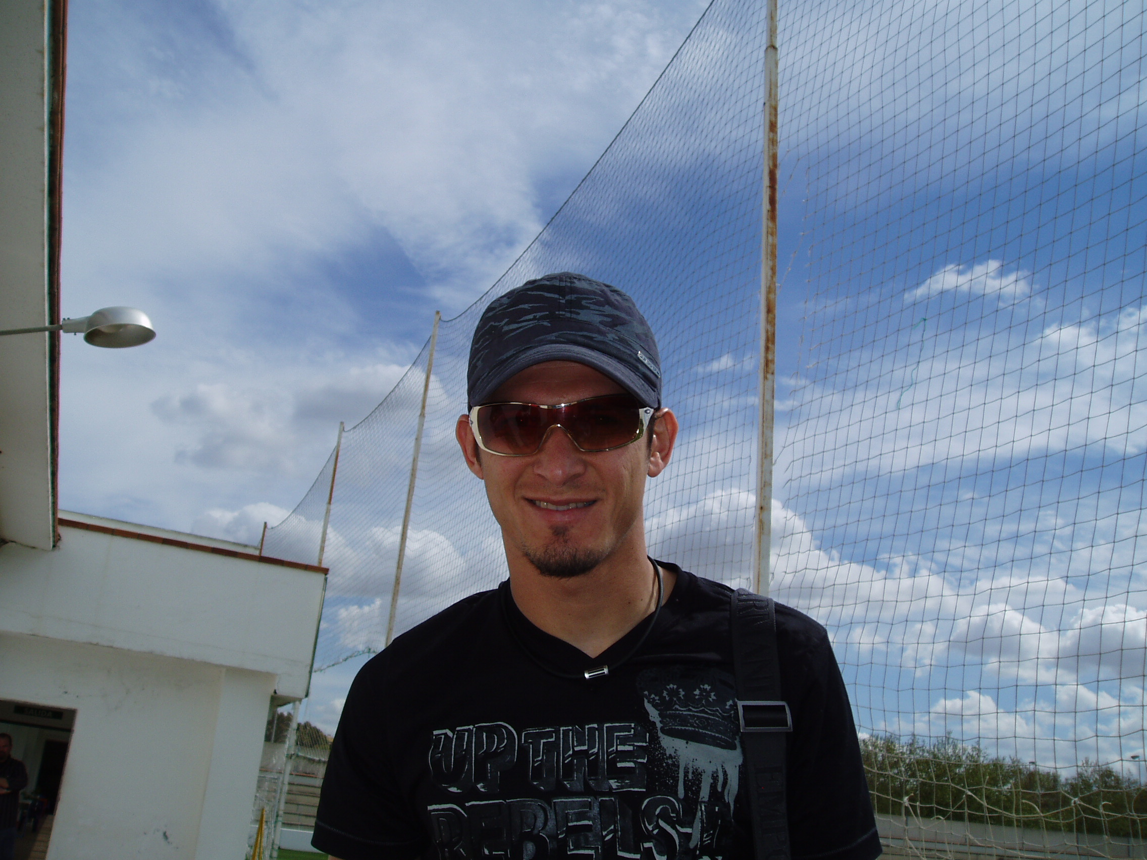 El jugador Luis Eduardo Schmidt, "Edu", a la salida de los entrenamientos